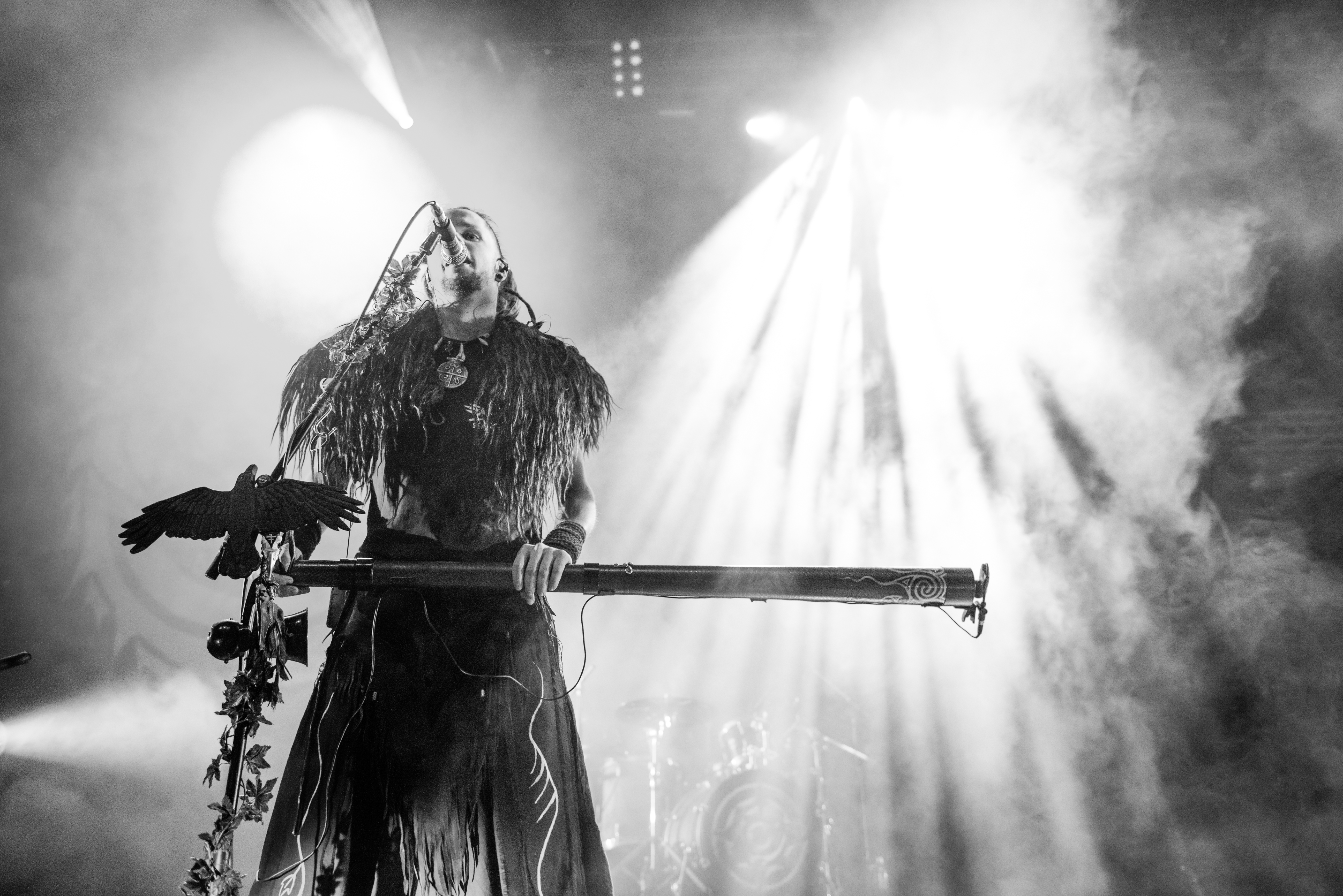 'Mittelalterlich Phantasie Spectaculum 2014': 'Omnia'